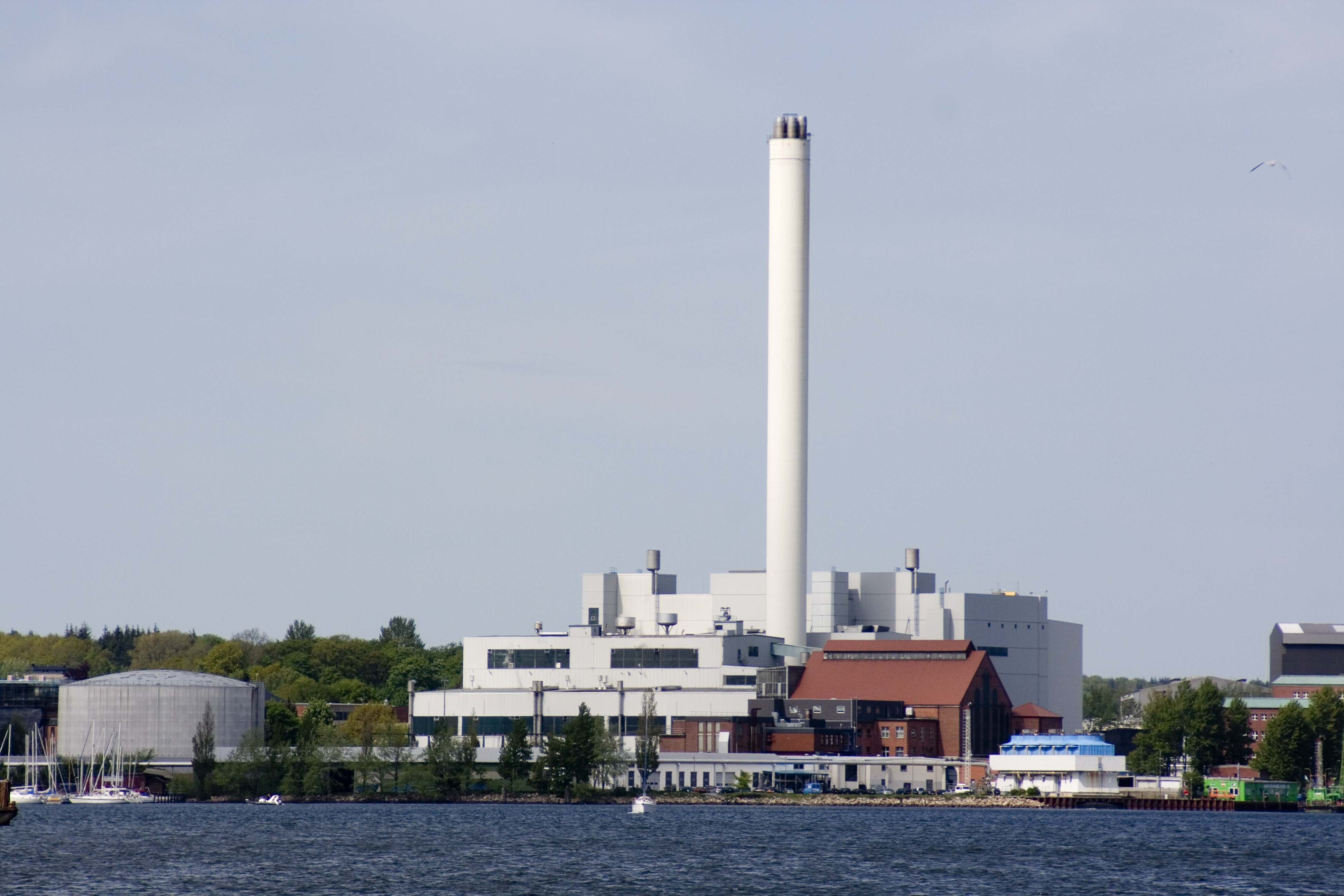 Stadtwerke Flensburg von der Hafenspitze aus gesehen.